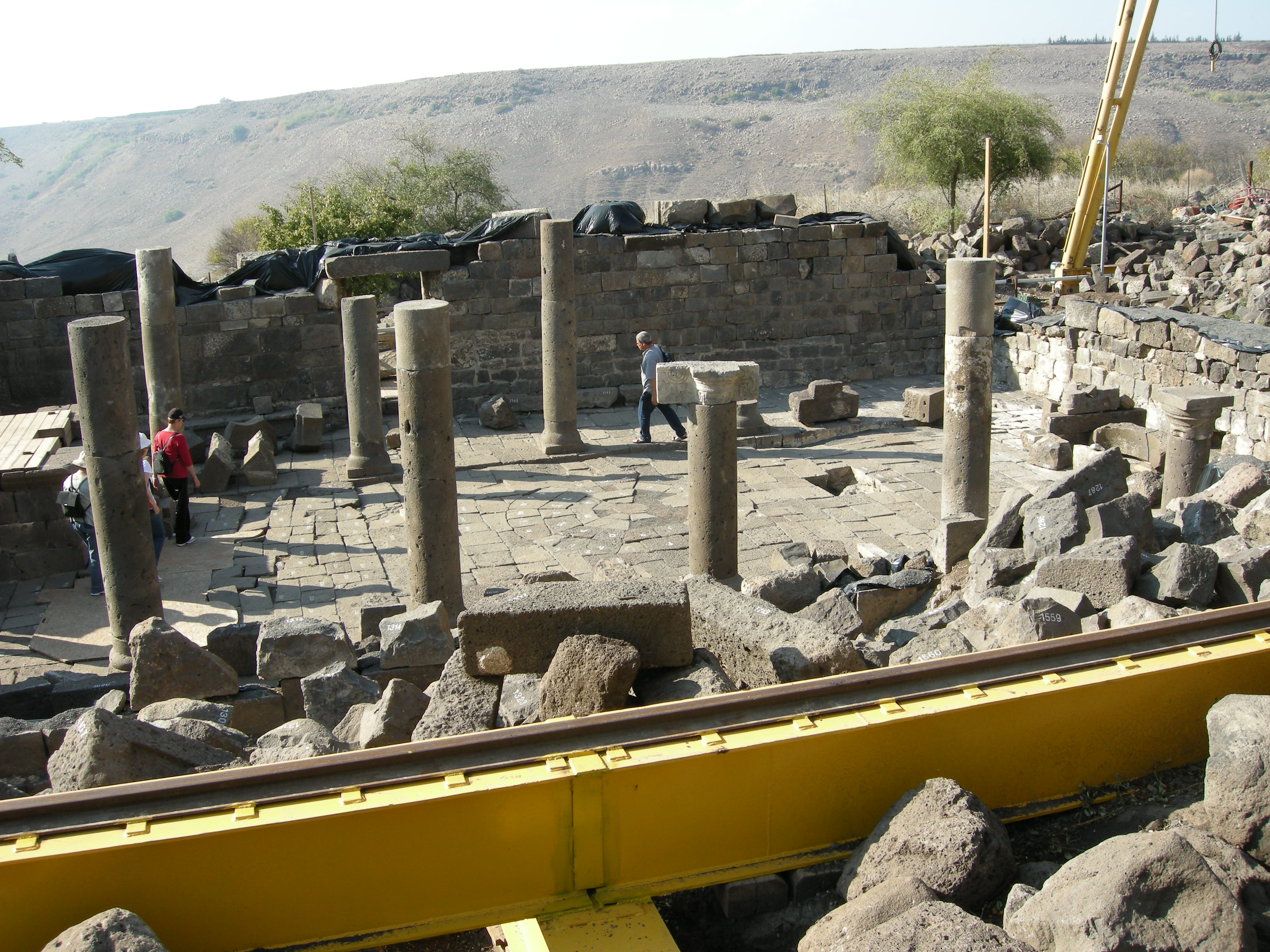 Um el Kantar